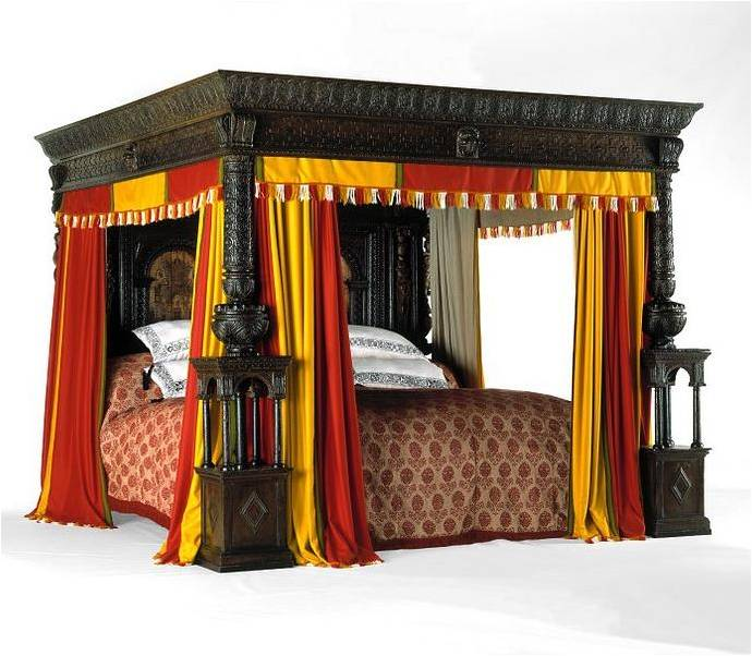 Llit